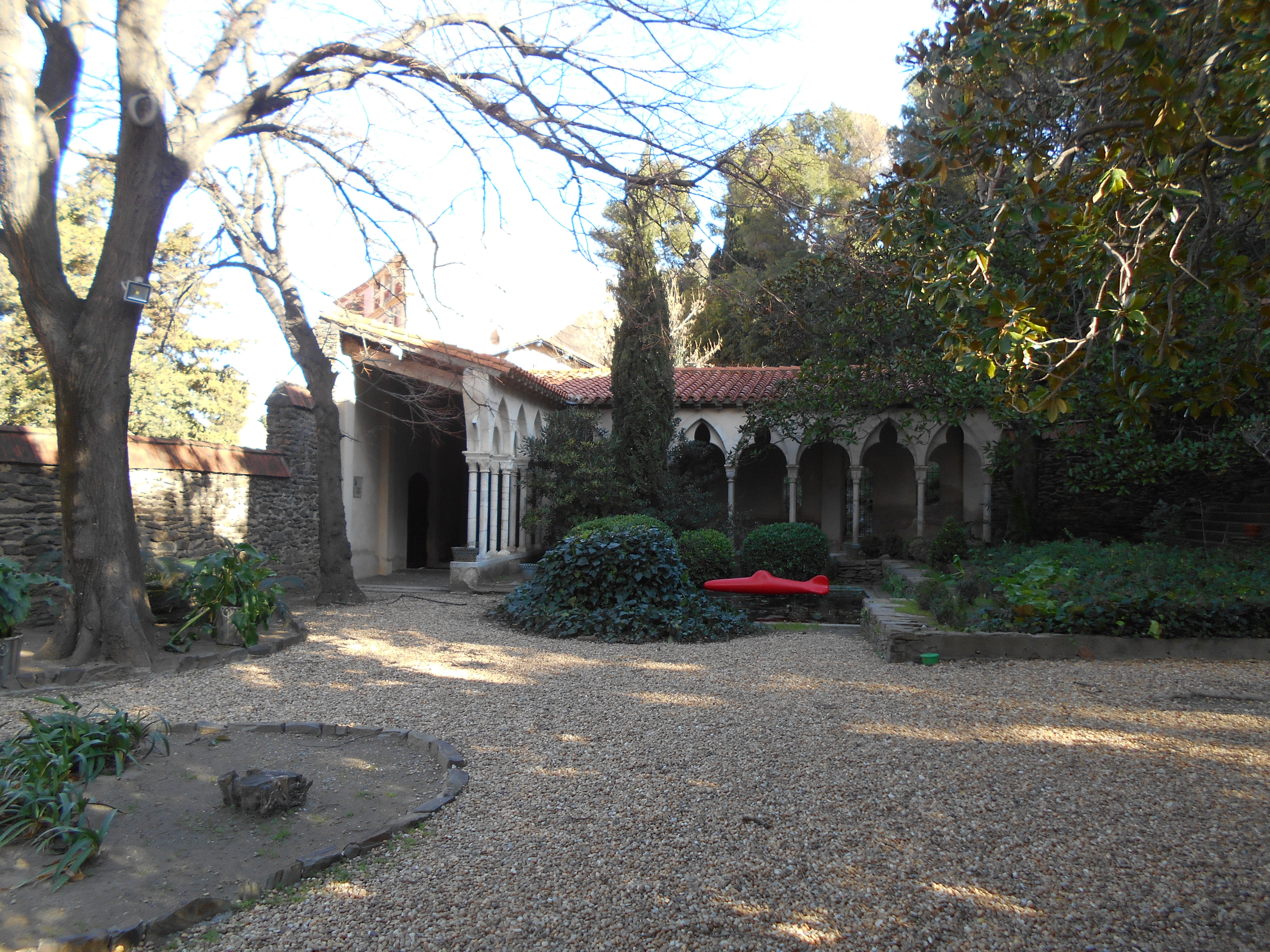 Sant Domènec de Cotlliure